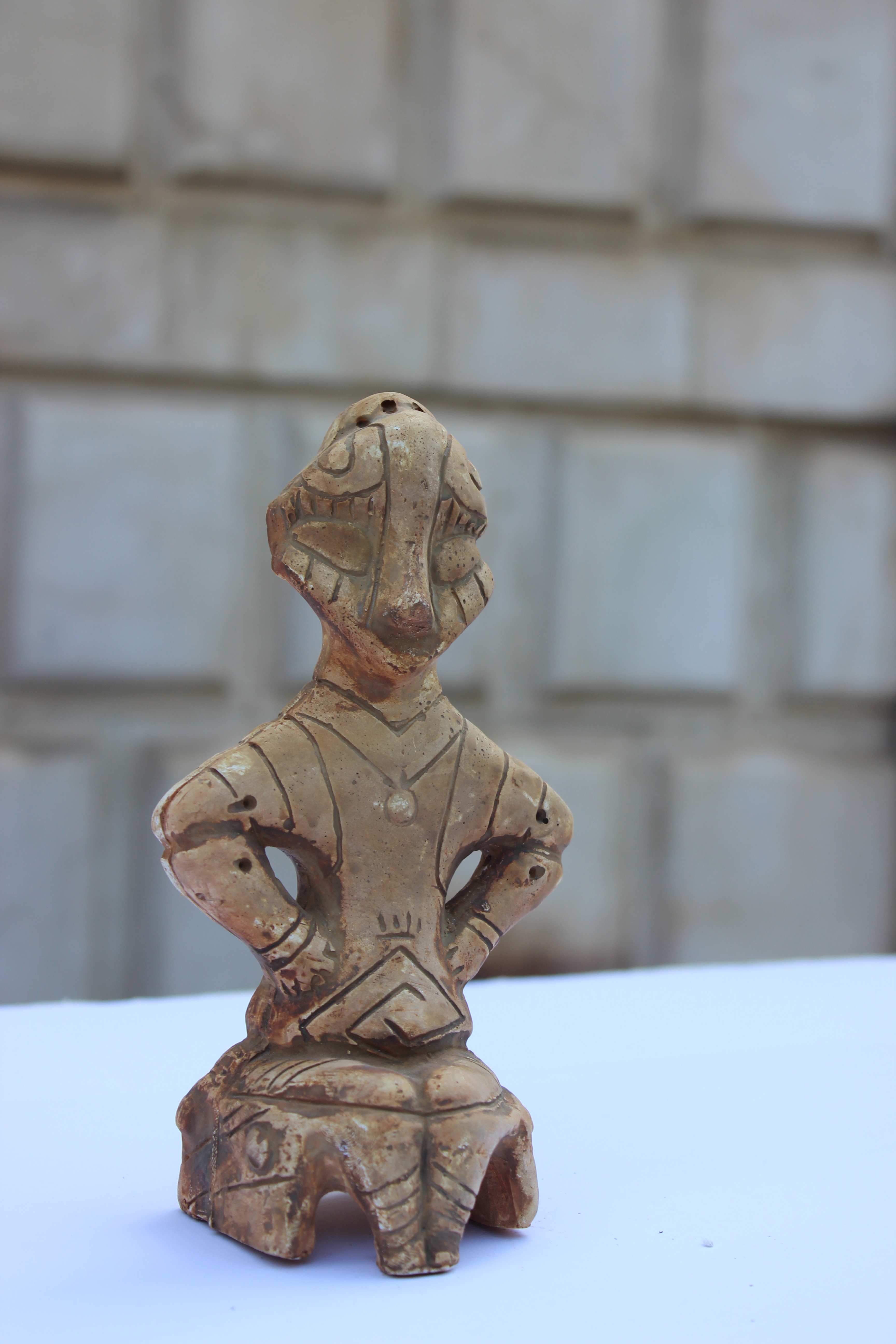 Figurinë antropomorfe e tipit “Hyjnësha e ulur në fron”